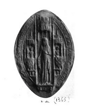 Margaret I, Countess of Burgundy